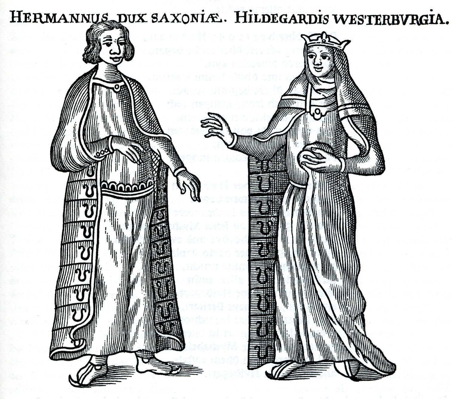 Sachsenherzog Hermann Billung und seine Ehefrau Hildegard von der Westerburg